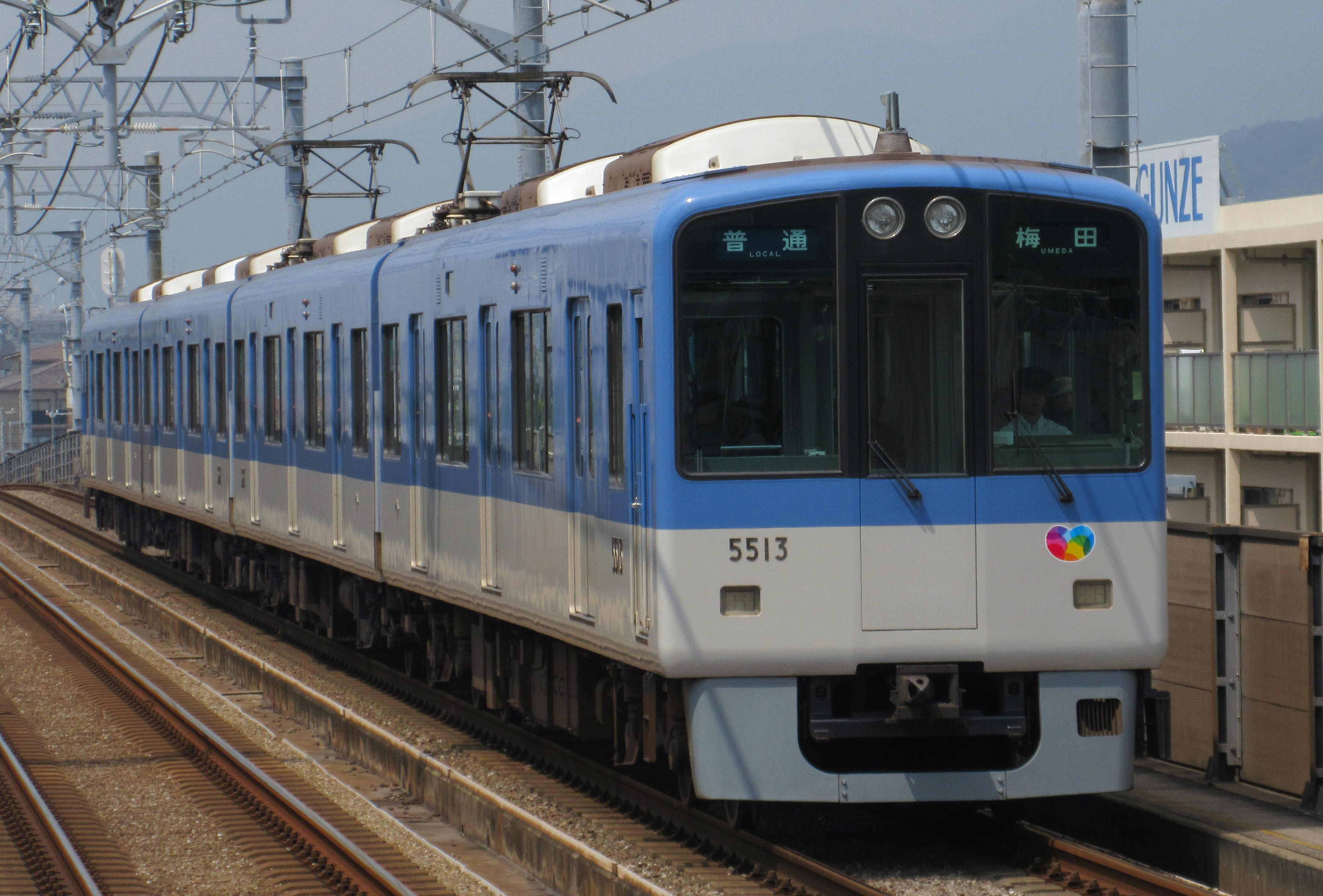 阪神電鉄5513編成 (香櫨園駅にて)